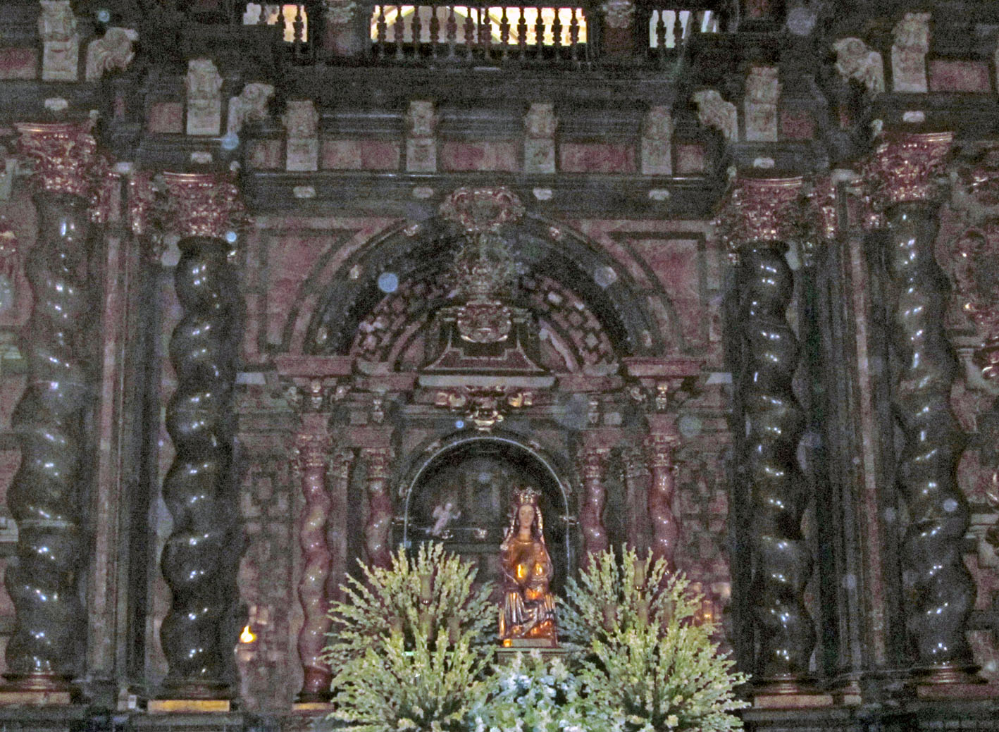 Altar de Santa María la Mayor en el trascoro de la catedral de Sigüenza (Spain)